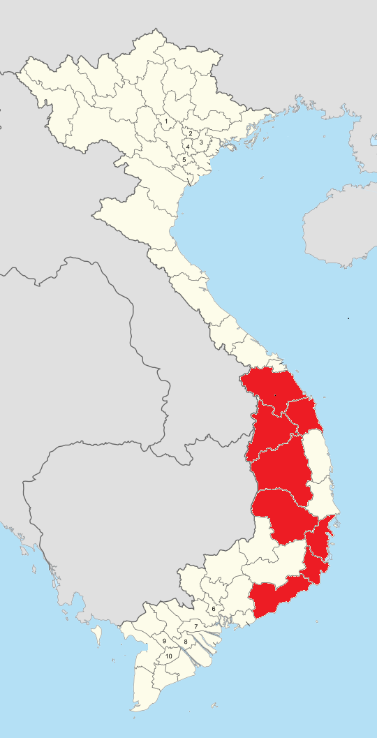 色當族的分布與越南行政單位劃分的對照